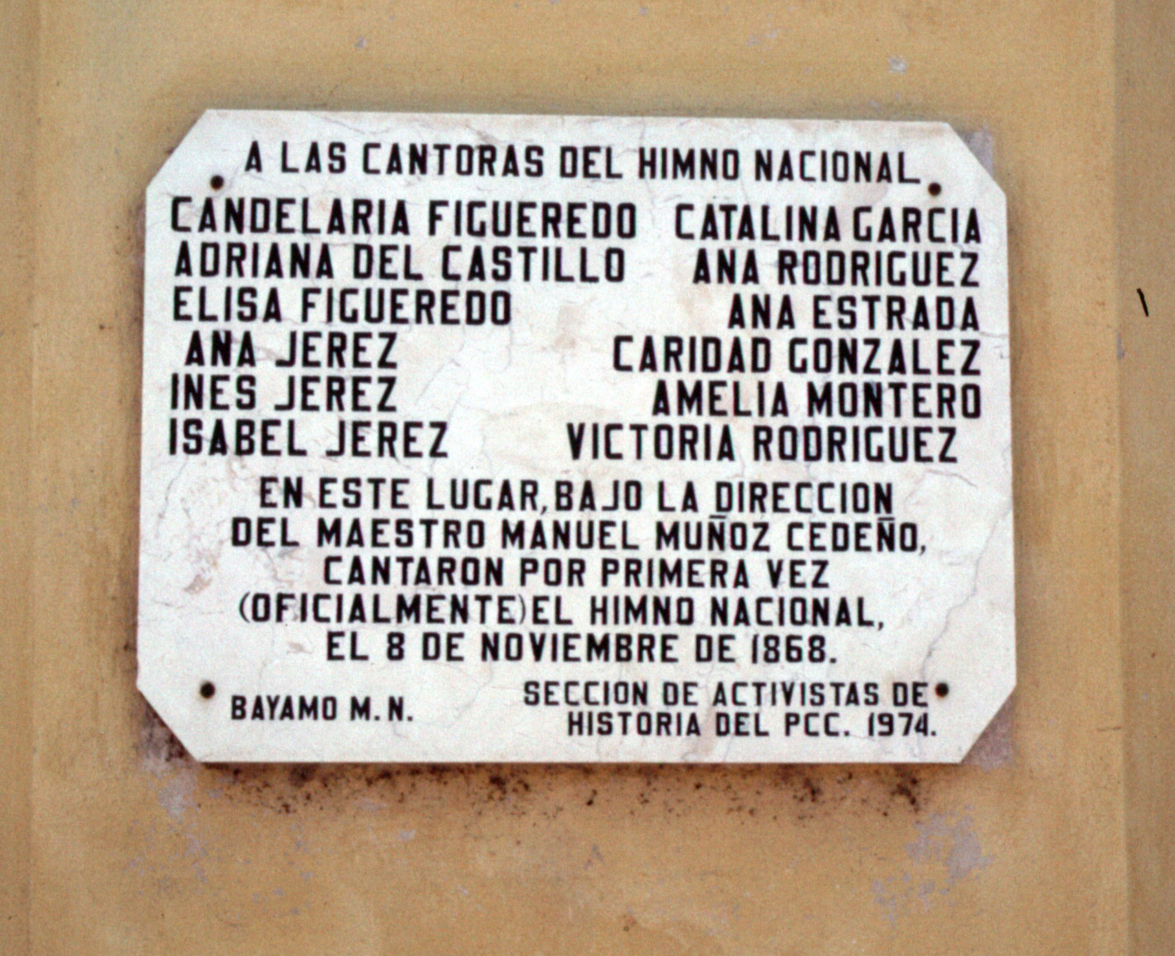 Tafel in Bayamo / Kuba, die daran erinnert, dass an dieser Stelle die kubanische Nationalhymne "La Bayamesa" zum ersten Mal gesungen wurde